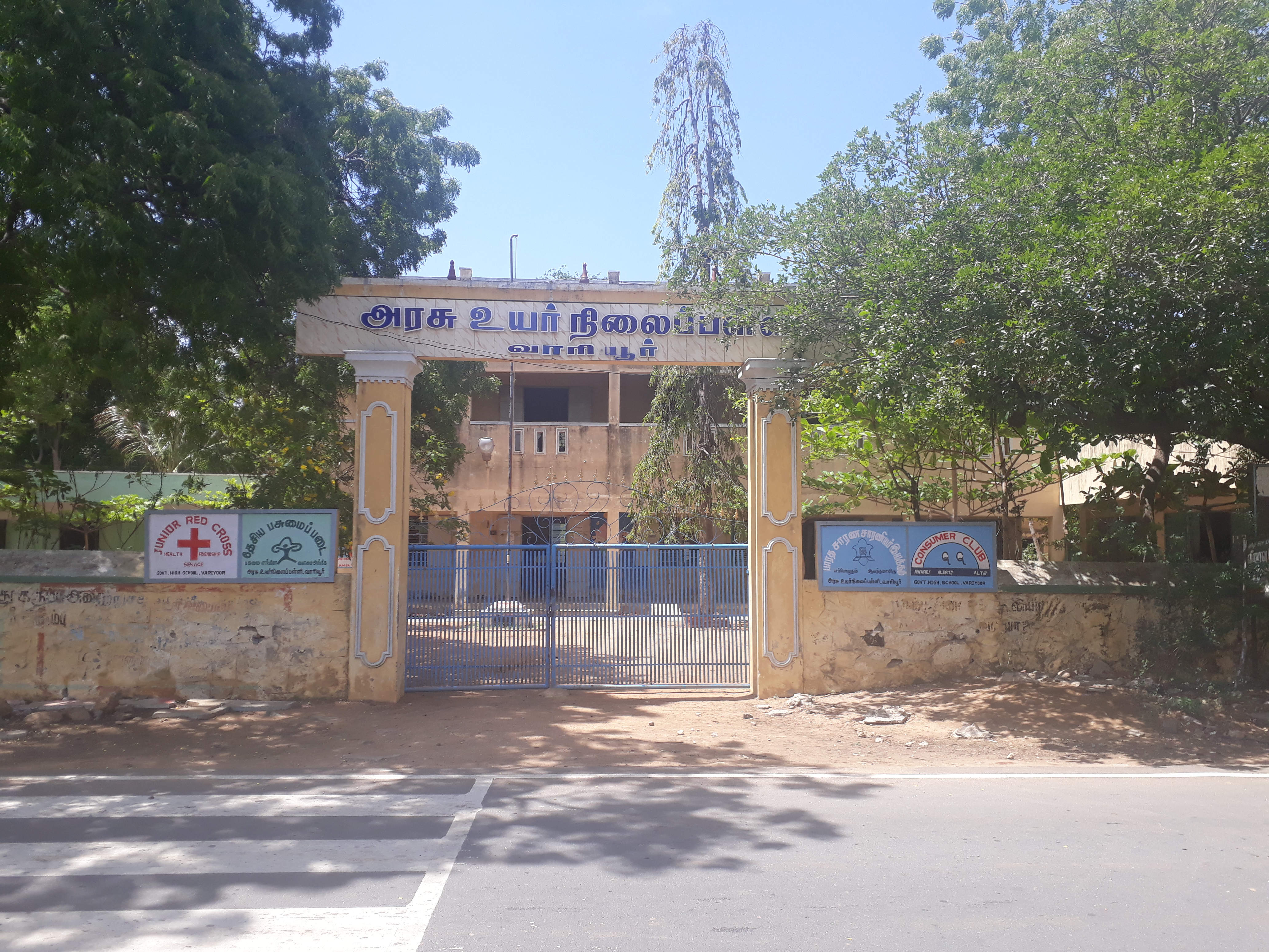 வாரியூர் அரசு உயர்நிலைப்பள்ளியின் எழில்மிகு தோற்றம்